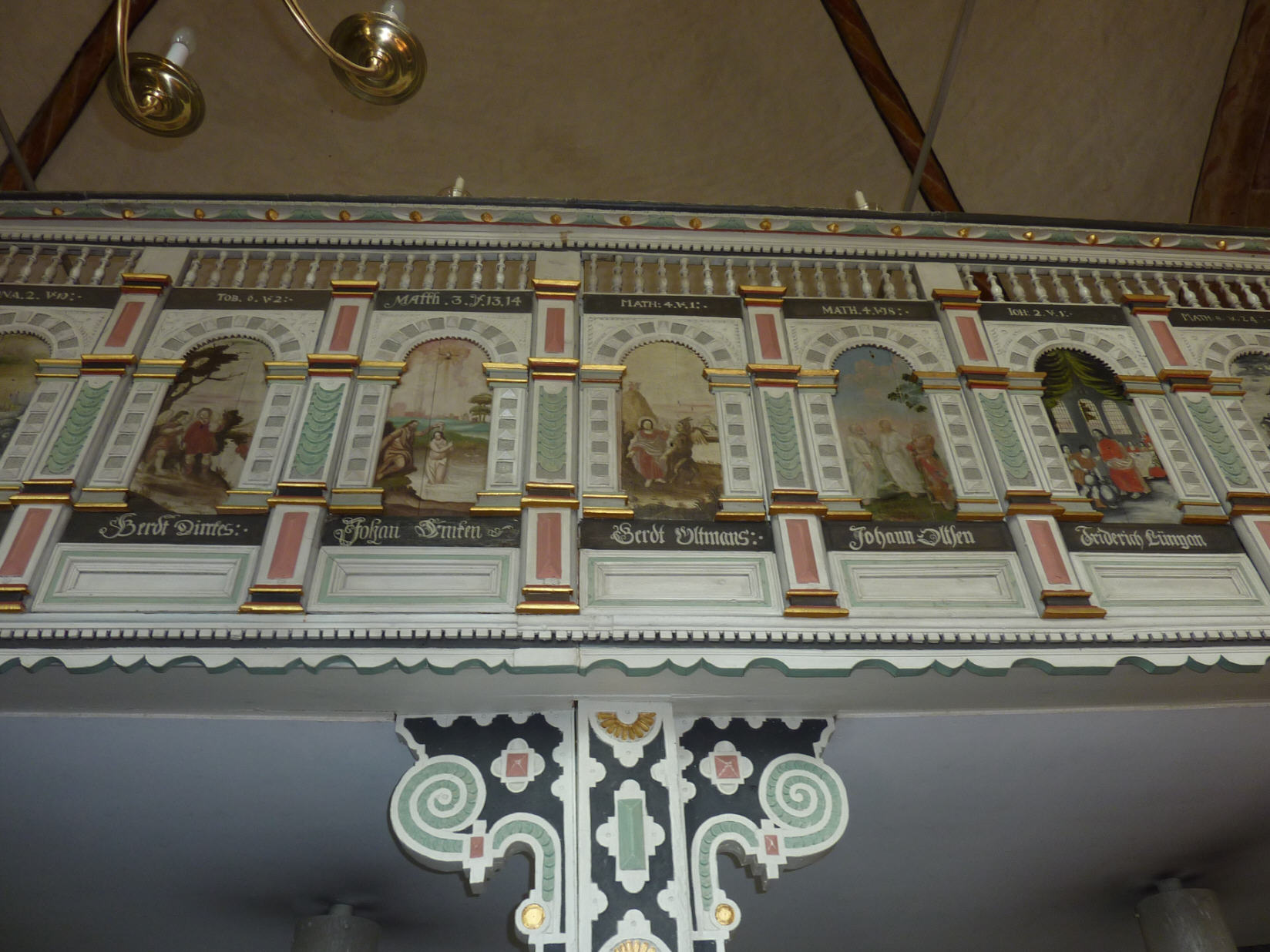 Empore in St. Johannes, Bad Zwischenahn